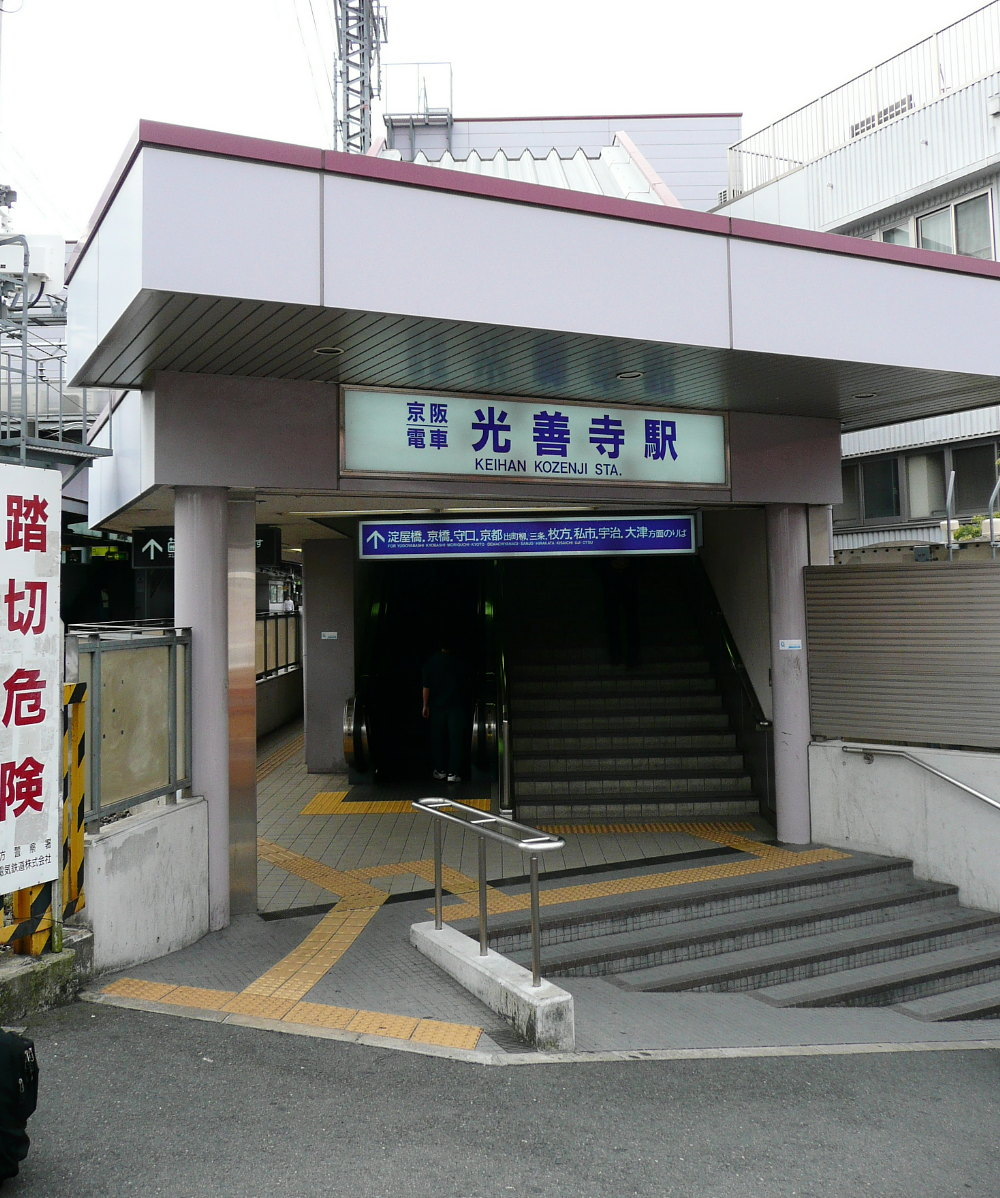 京阪電気鉄道京阪本線光善寺駅西口